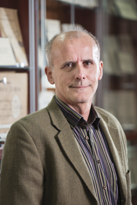 Српски (ћирилица): професор Драго Дивљак